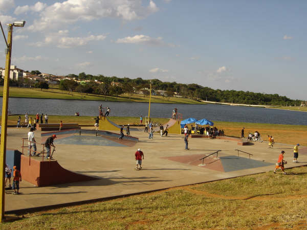 Lazer e desporto em torno de um lago artificial em Catalão, Goiás. na ocasião.